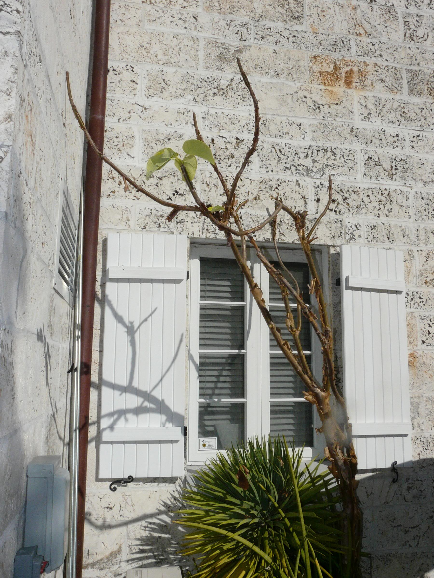 Jatropha chamelensis